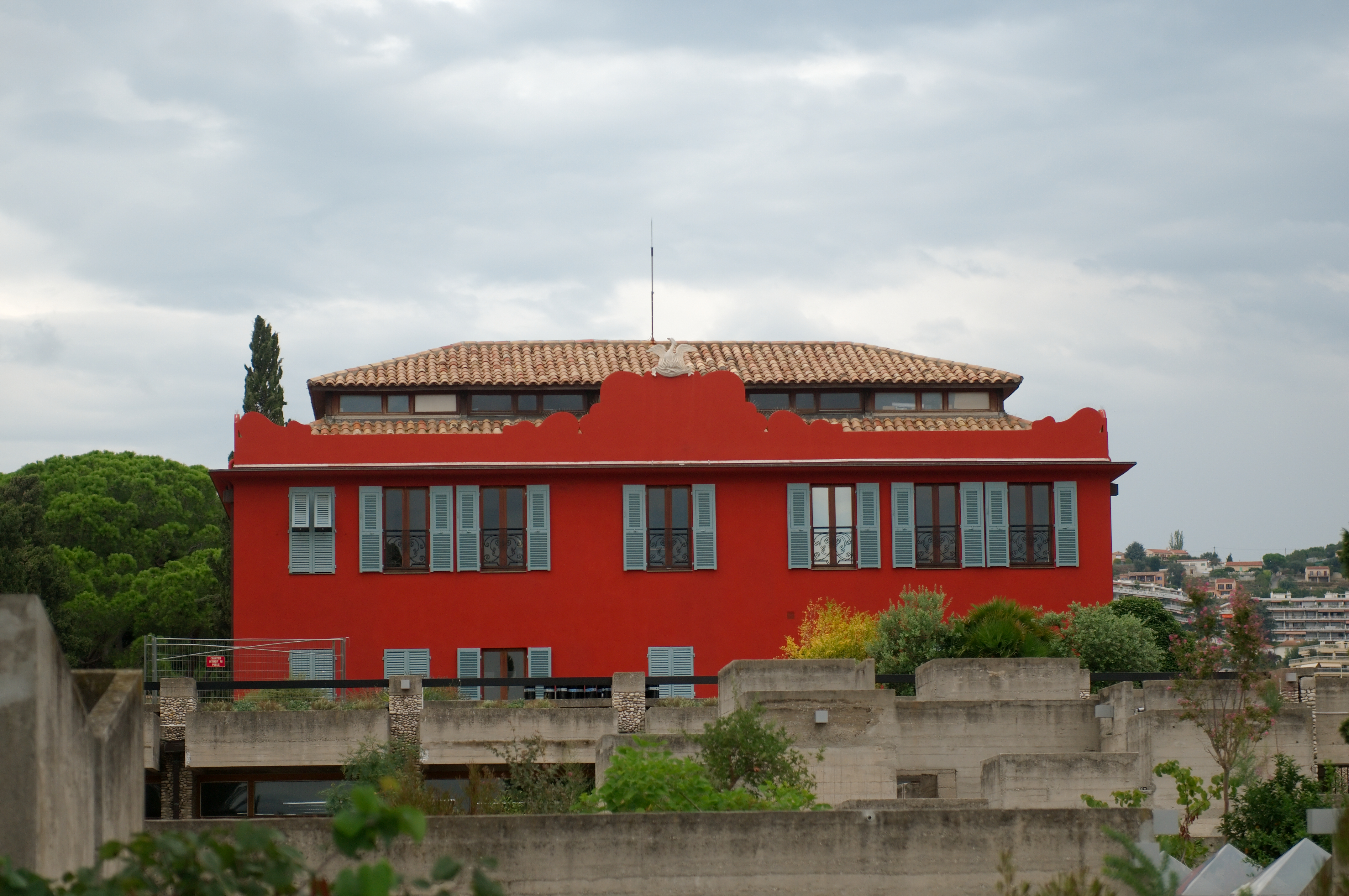 Villa Arson - ancien batiment